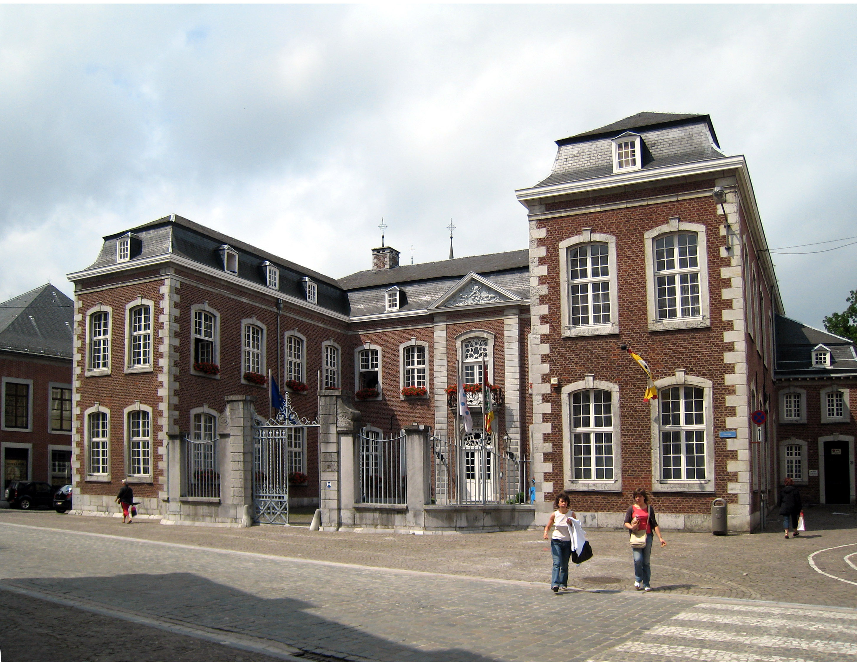 Tuchverlegergebaude Nikolaus Joseph de Grand Ry, erbaut 1760-1763, vermutlich von Johann Joseph Couven, heute (2011) Sitz der Regierung der Deutschsprachigen Gemeinschaft Belgiens